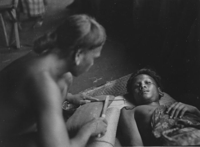 foto. Het aanbrengen van een tatoeage door een Dajak, West-Borneo.